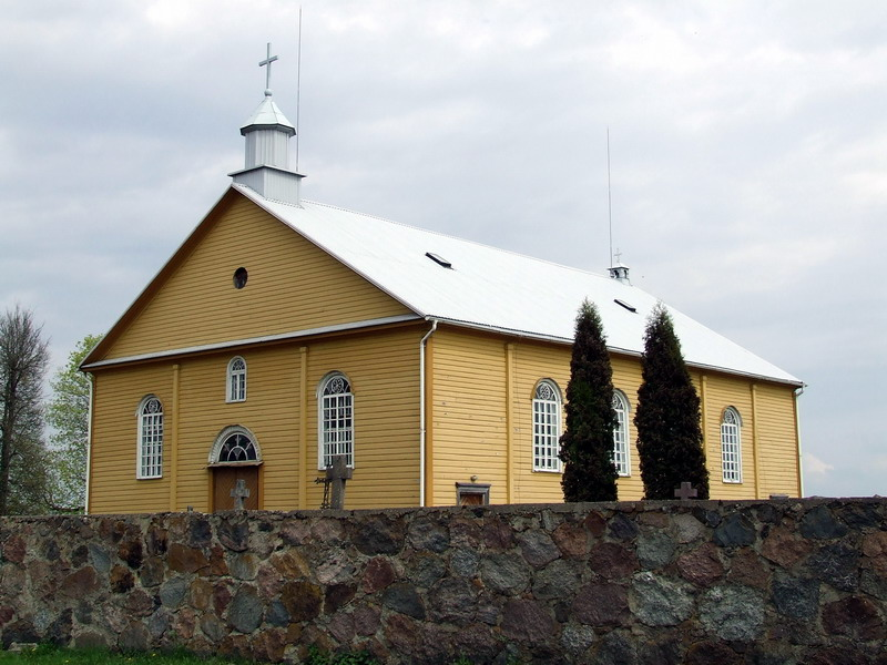 Želvos Šv. Ignaco Lojolos bažnyčia